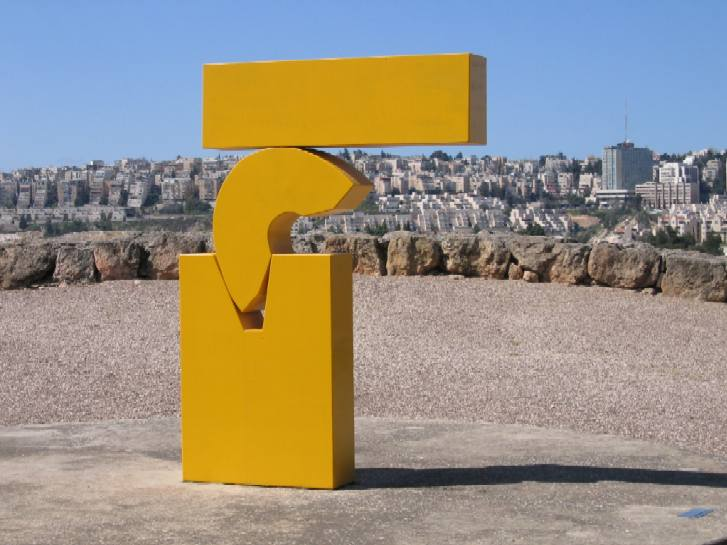 Sculpture